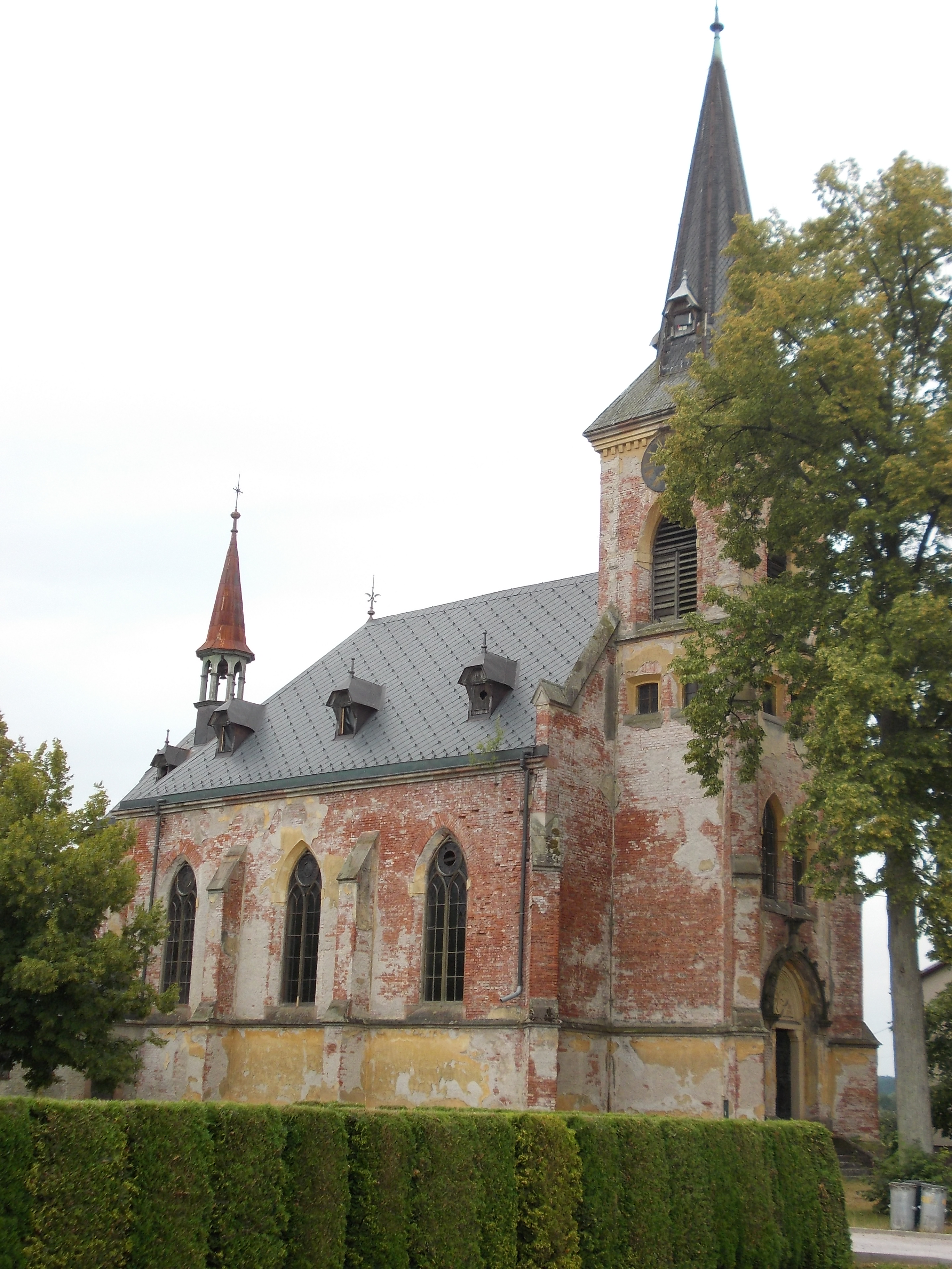 Prosečné - kostel svaté Alžběty